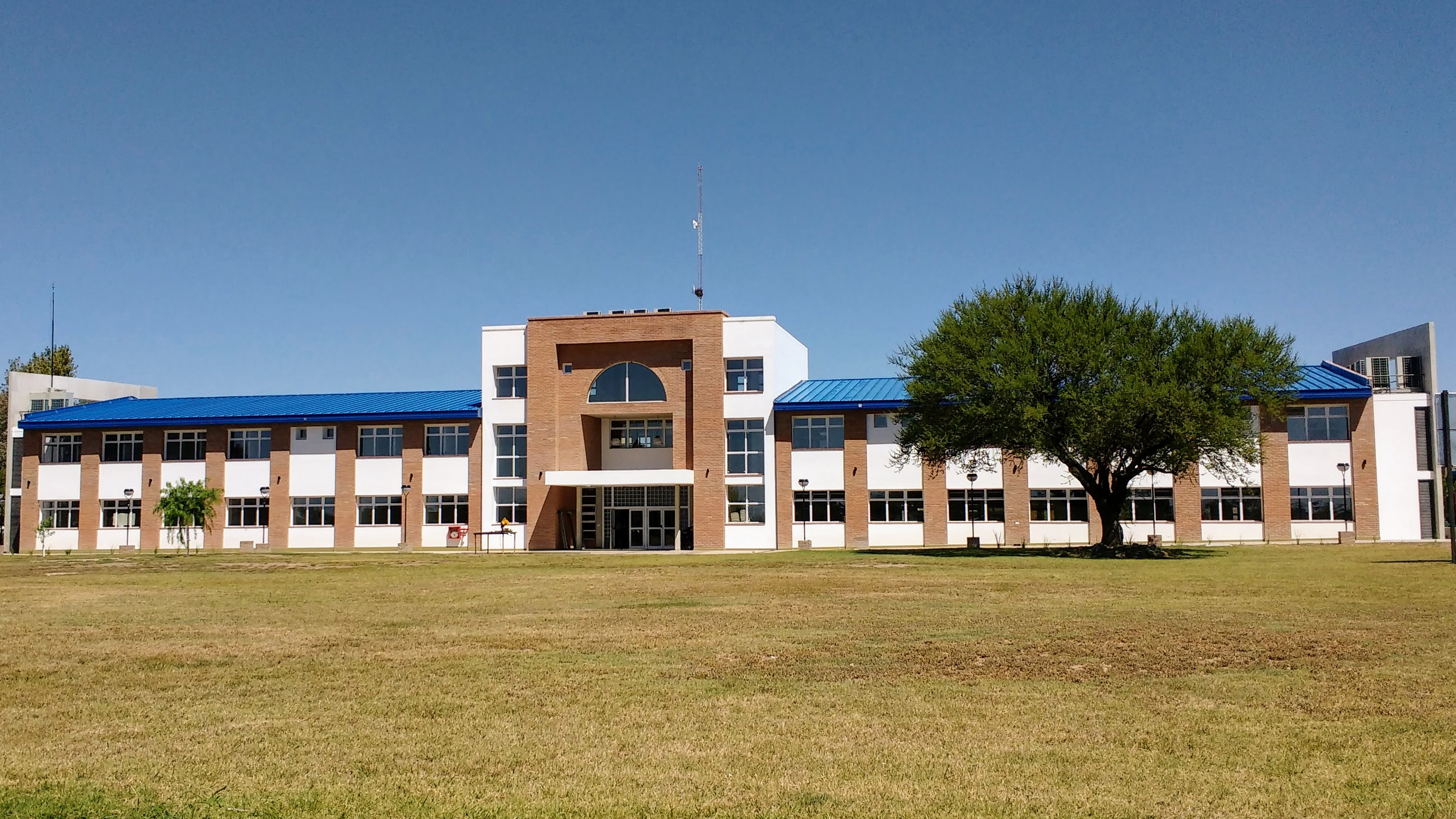 Edificio aulas e investigación de la Universidad Nacional de Villa María, Córdoba, Argentina.